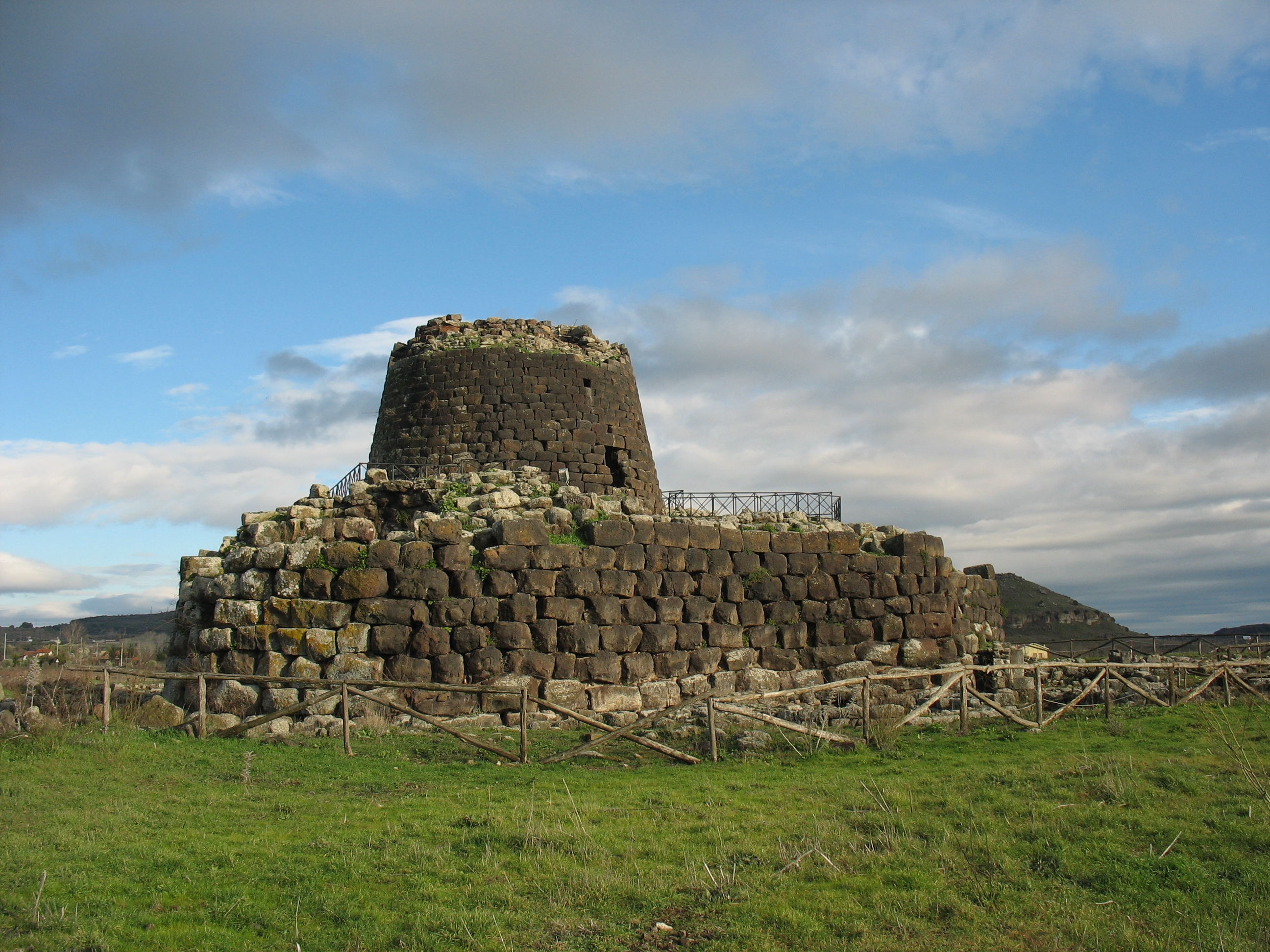 Torralba (Sardinien), Nuraghe Santu Antine von Südwesten gesehen